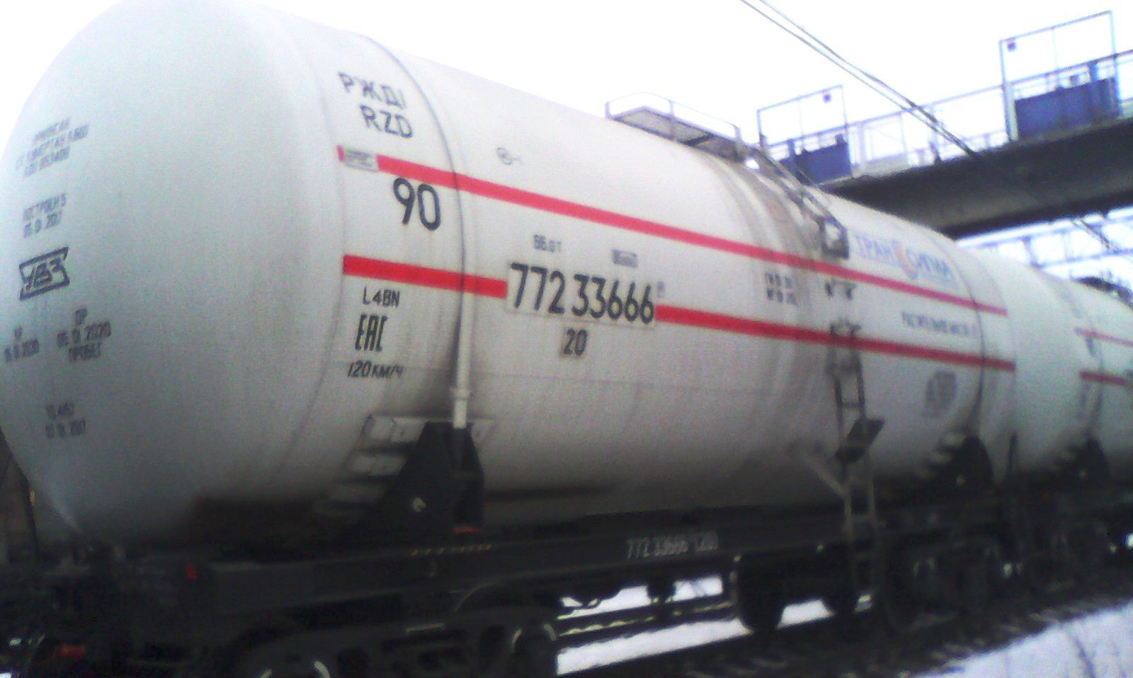 4-х осный вагон-цистерна для растительного масла. Россия.